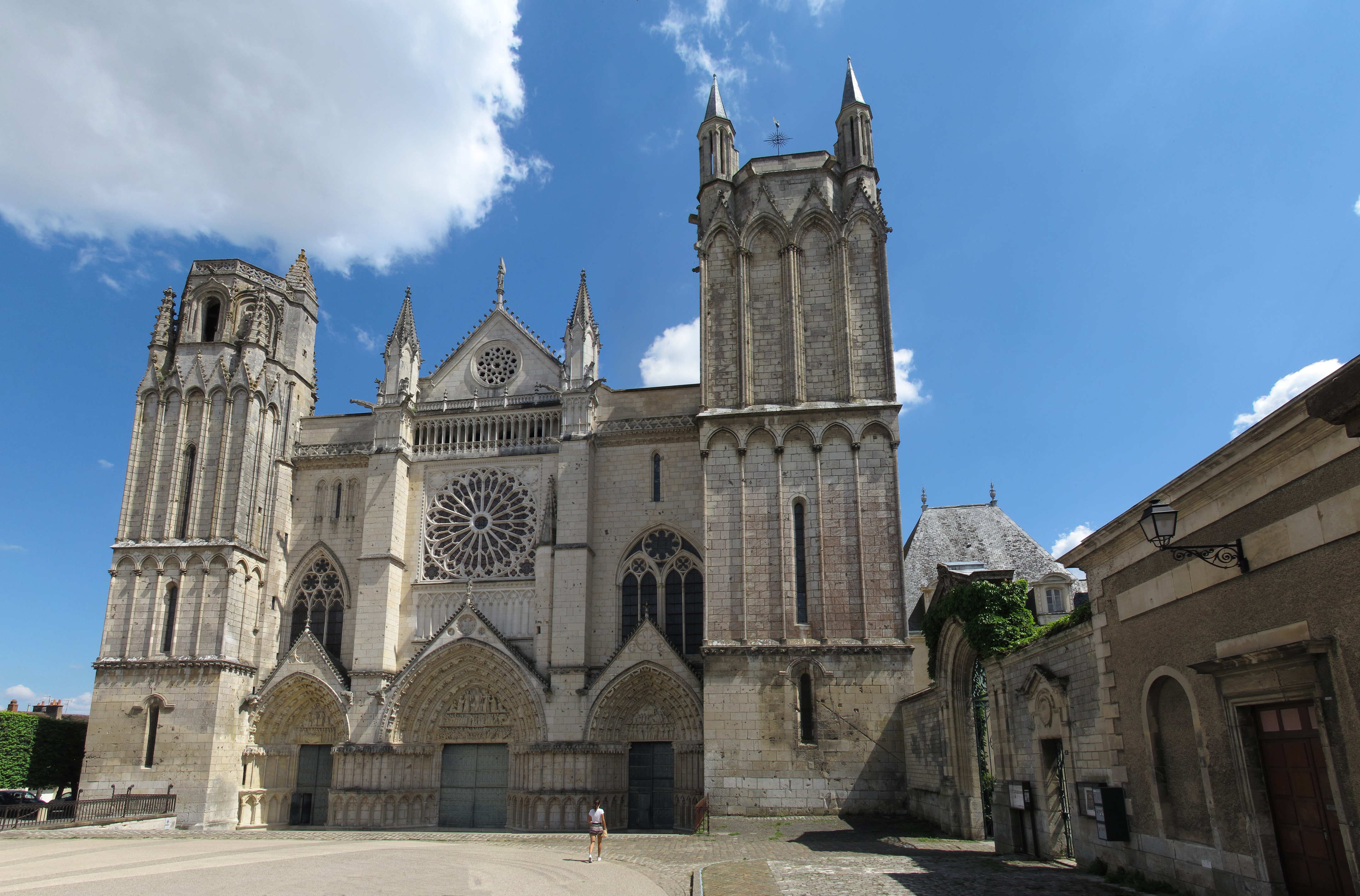 Poitiers (Frankreich): Kathedrale „Saint-Pierre“ (Panorama der Westseite)